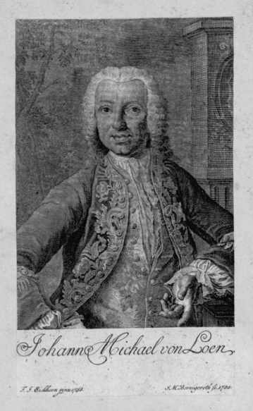 Johann Michael von Loen (Schriftsteller, Goethes Großonkel)